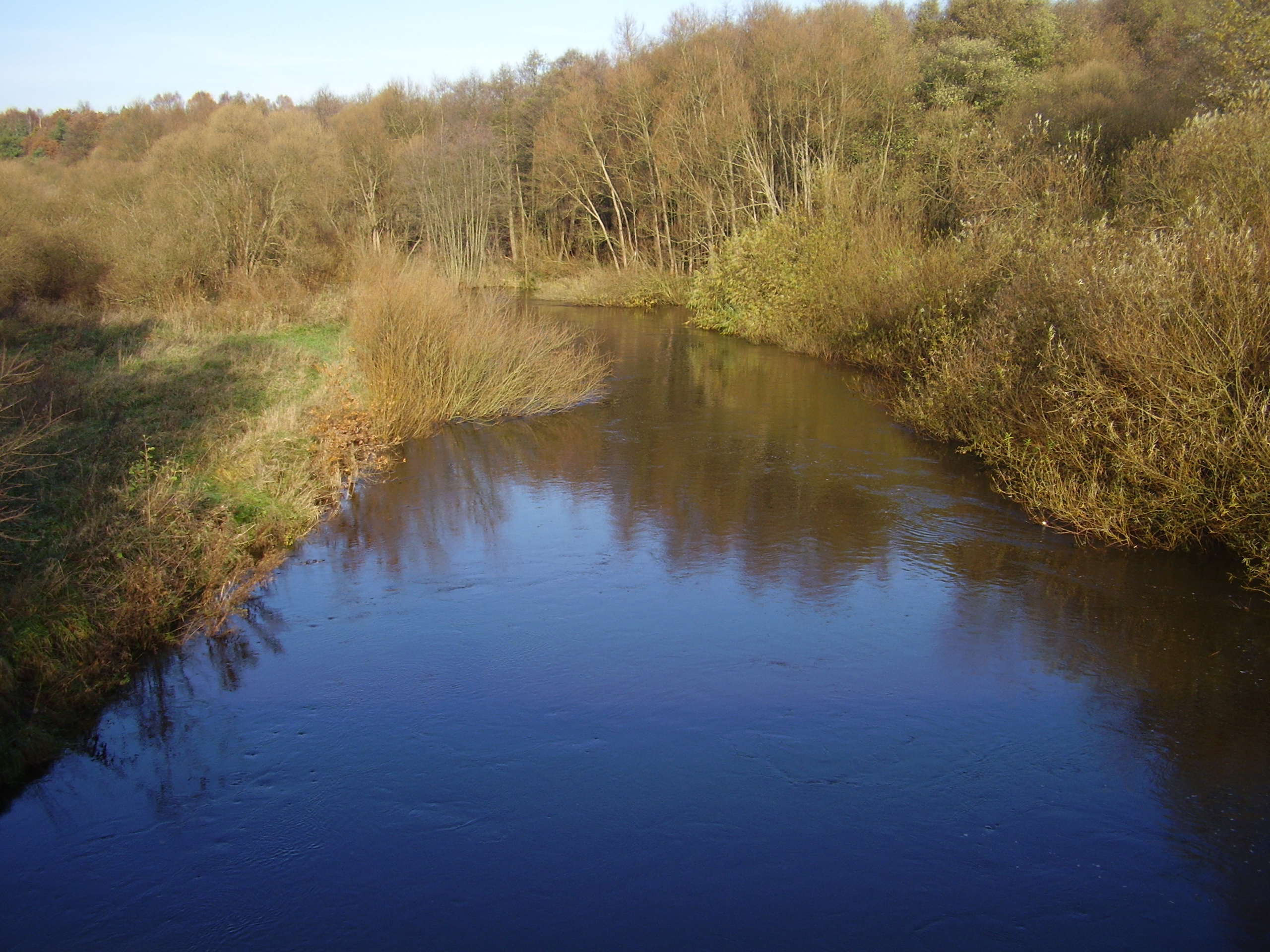 Karlino, widok na Parsętę; autor zdjęcia Uczeń; 14.02.2007 r.